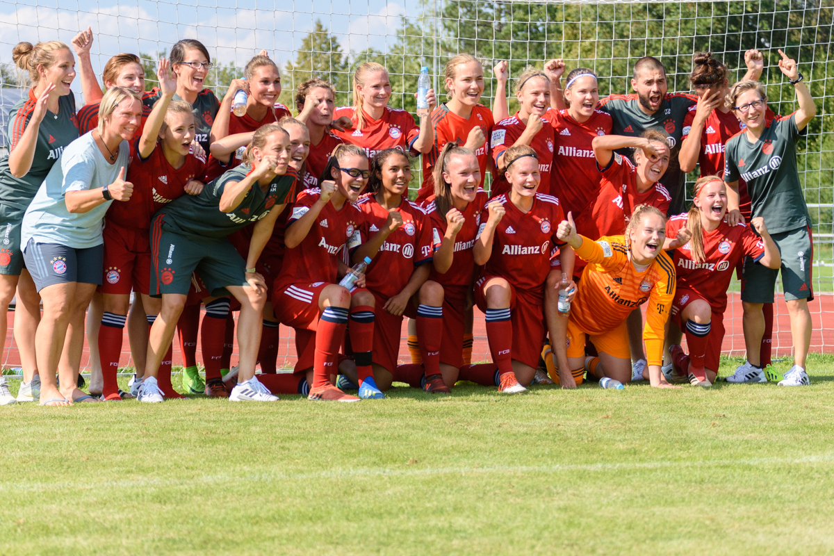 FC Bayern Frauen II after a game vs SV 67 Weinberg, in August 2018